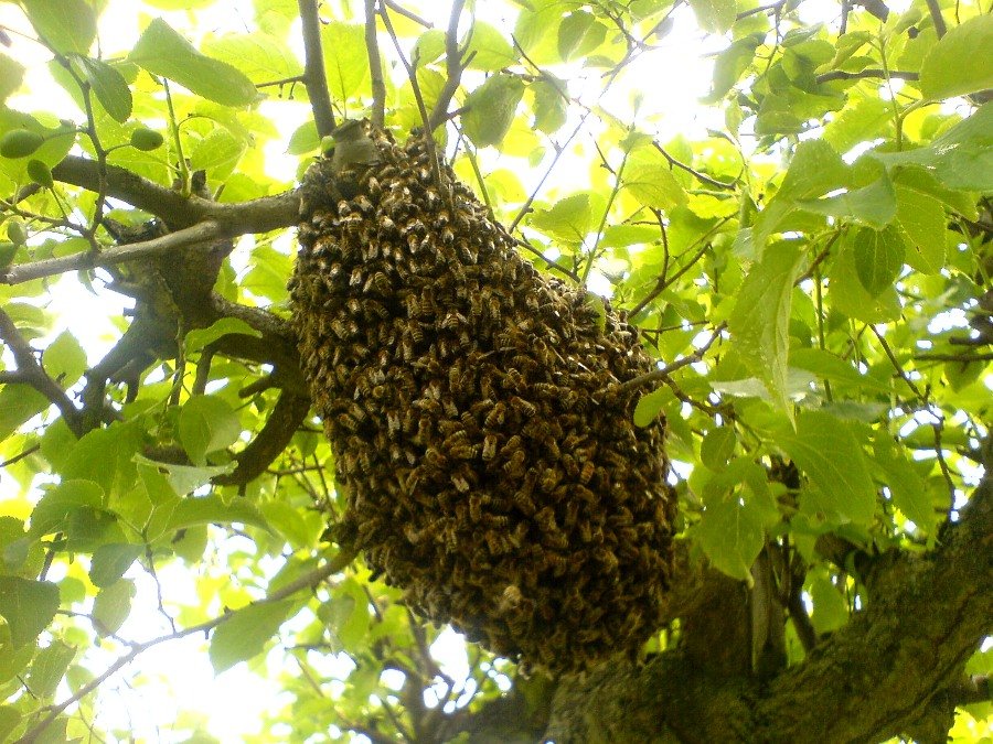 Schwarm im Baum